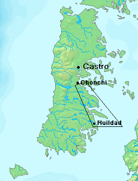 Área del Archipiélago de Chiloé (Chile) conocida como Costa de los Payos durante la Colonia.